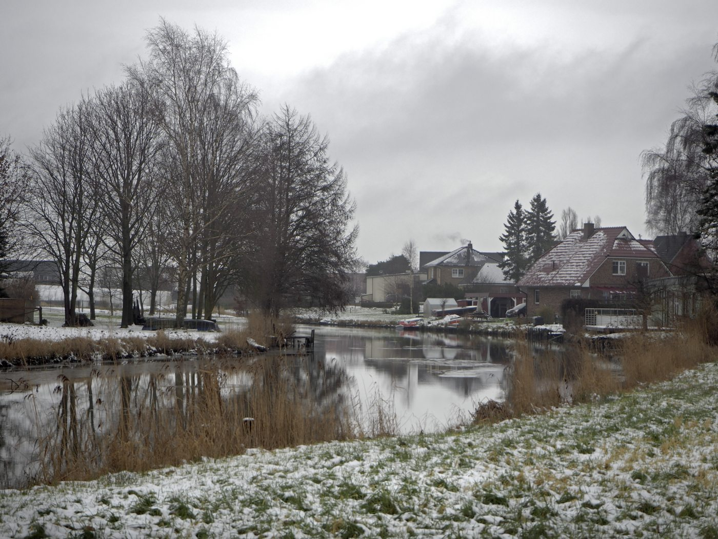 Engelbrechtsche Wildnis (Schleswig-Holstein), Herzhorner Rhin, Foto 2015